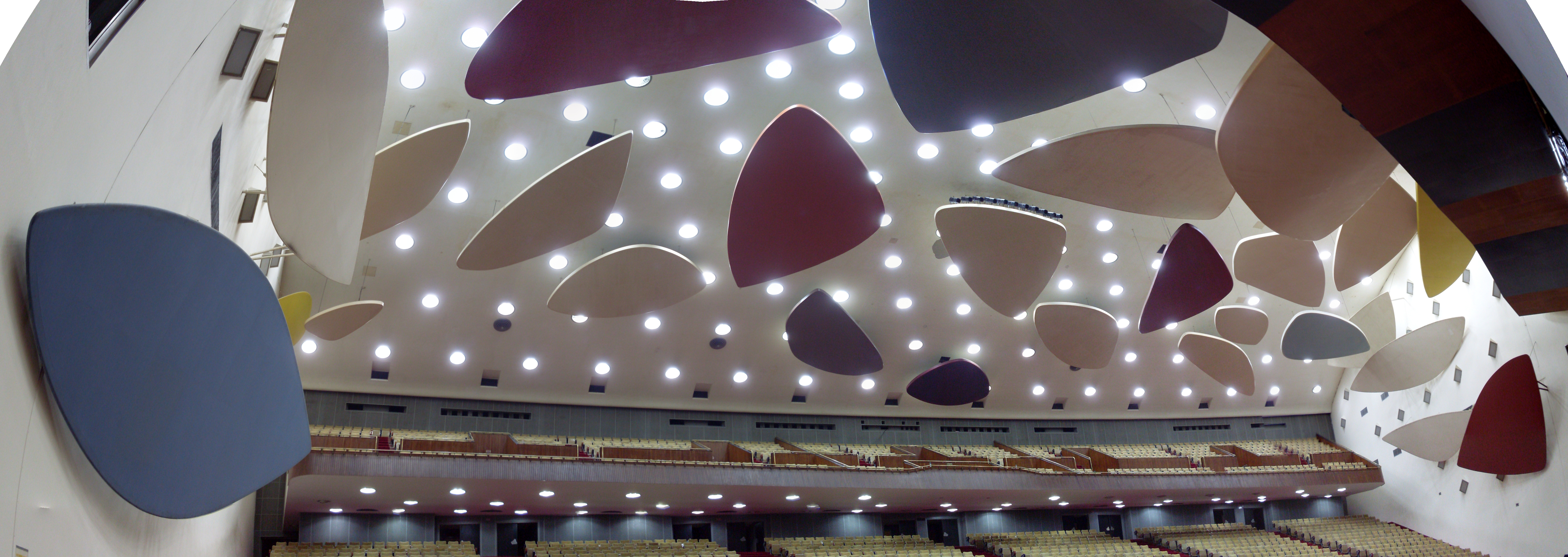 Panorama del Aula Magna. Arriba se ven Las Nubes de Alexander Calder. La imagen es una composición fotográfica hecha con fotos individuales que fueron unidas con el programa Hugin Panorama Stitcher.